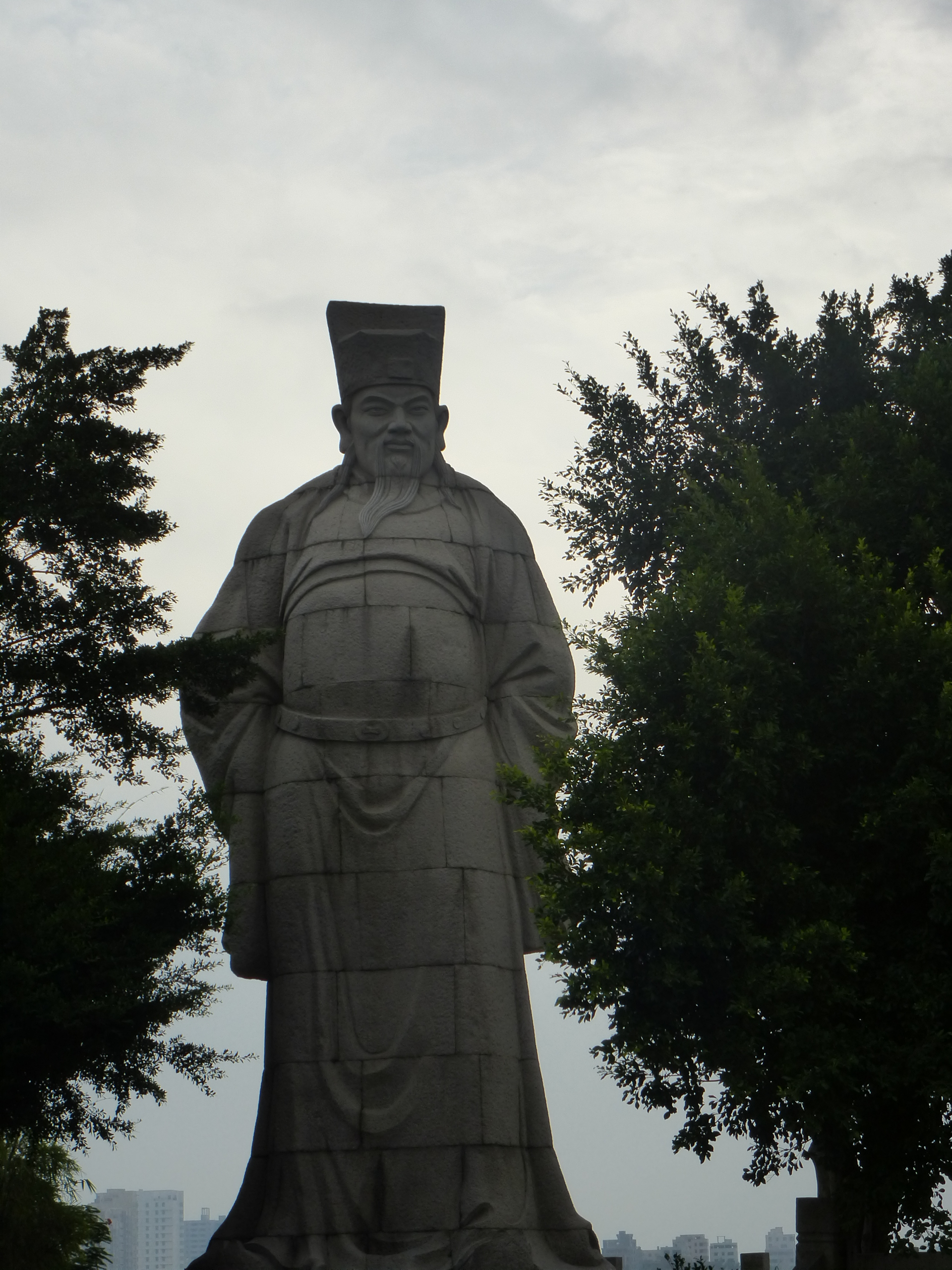 中文（中国大陆）: 蔡襄石立像